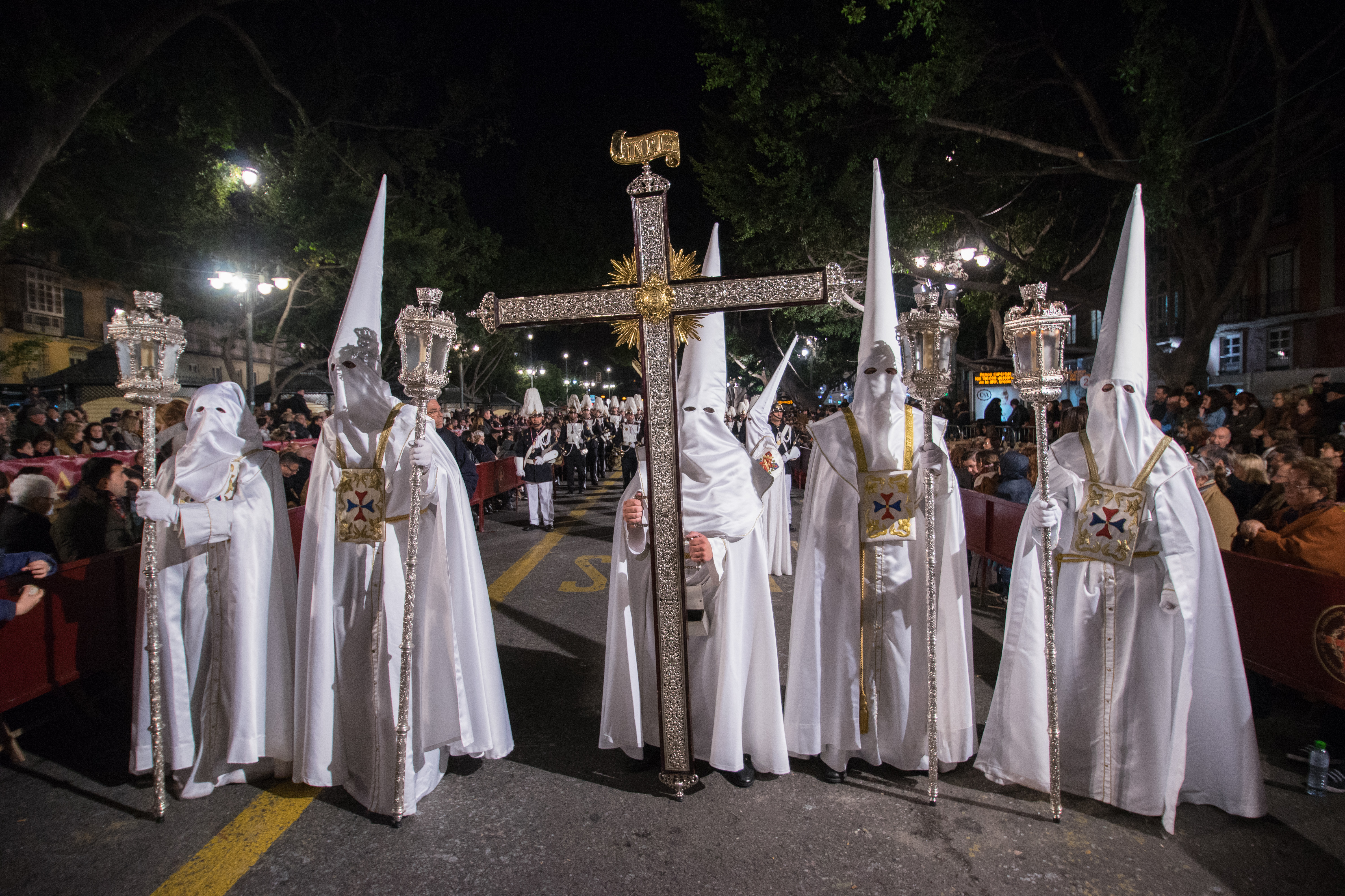 Cruz Guía de la Real, Muy Ilustre y Venerable Cofradía de Nazarenos de Nuestro Padre Jesús Cautivo, María Santísima de La Trinidad Coronada y del Glorioso Apóstol Santiago This is a photography of a Folklore festival in Spain (Wikidata id Q9075883).